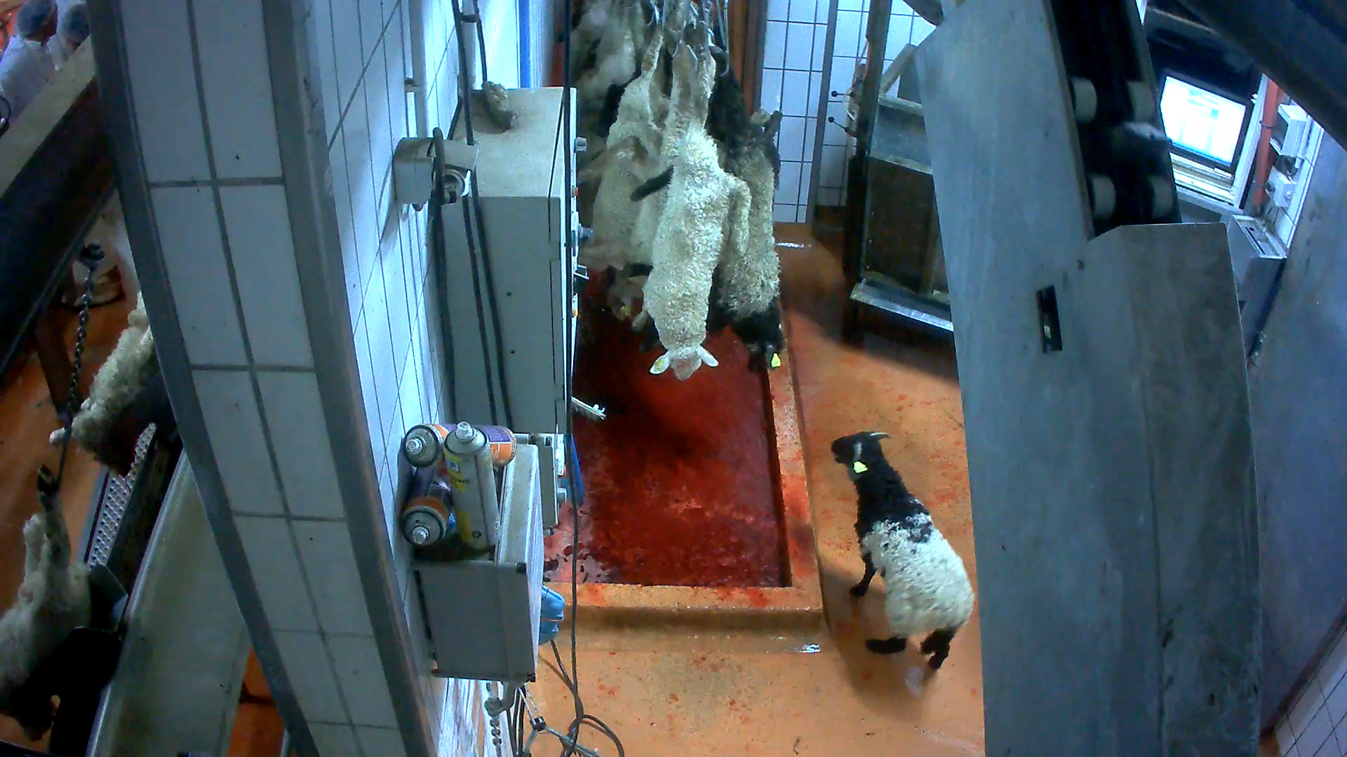 Moutons à l'abattoir de Mauléon-Licharre.